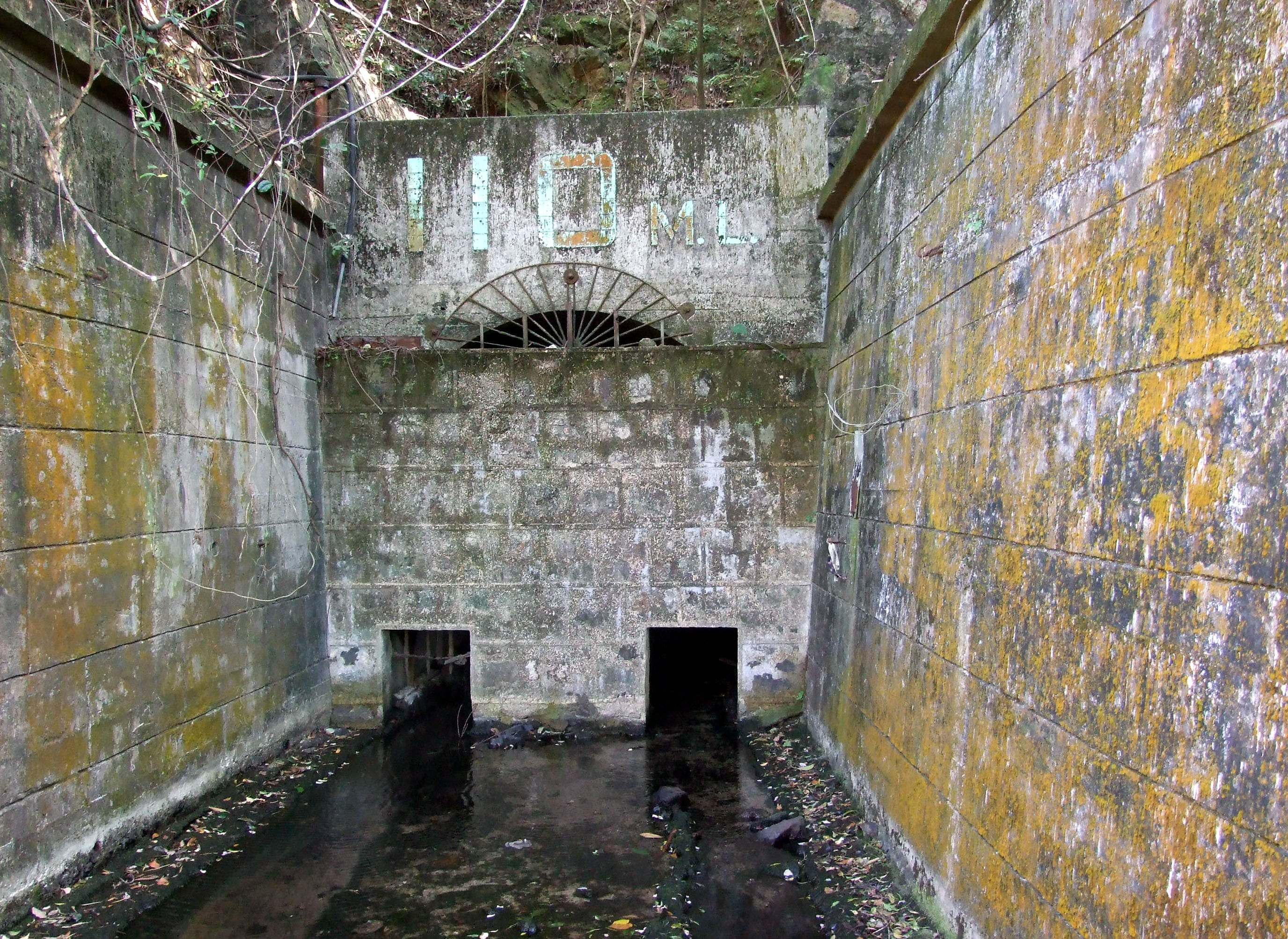 中文（香港）: 馬鞍山礦場110M隧道出口